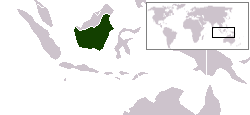 bewerking van "wereldkaart"